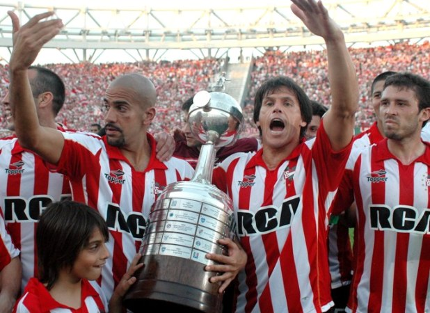 El plantel de Estudiantes de La Plata, en la vuelta olímpica por la obtención de la Copa Libertadores de América, luego de la victoria ante Gimnasia en el clásico platense del 29 de agosto de 2009.